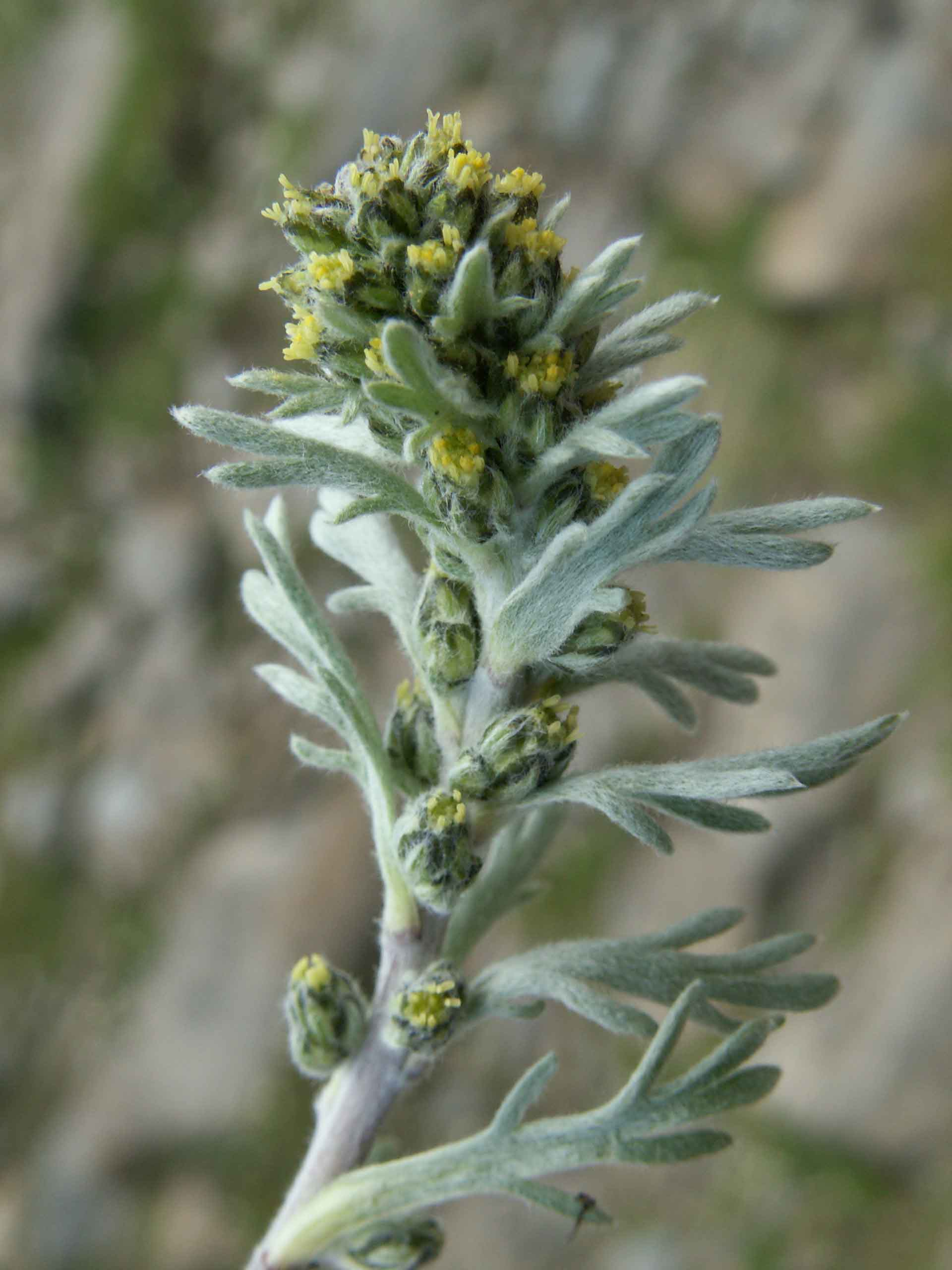 Ährige Edelraute (Artemisia genipi), Faulhorn (CH, Kt. Bern)